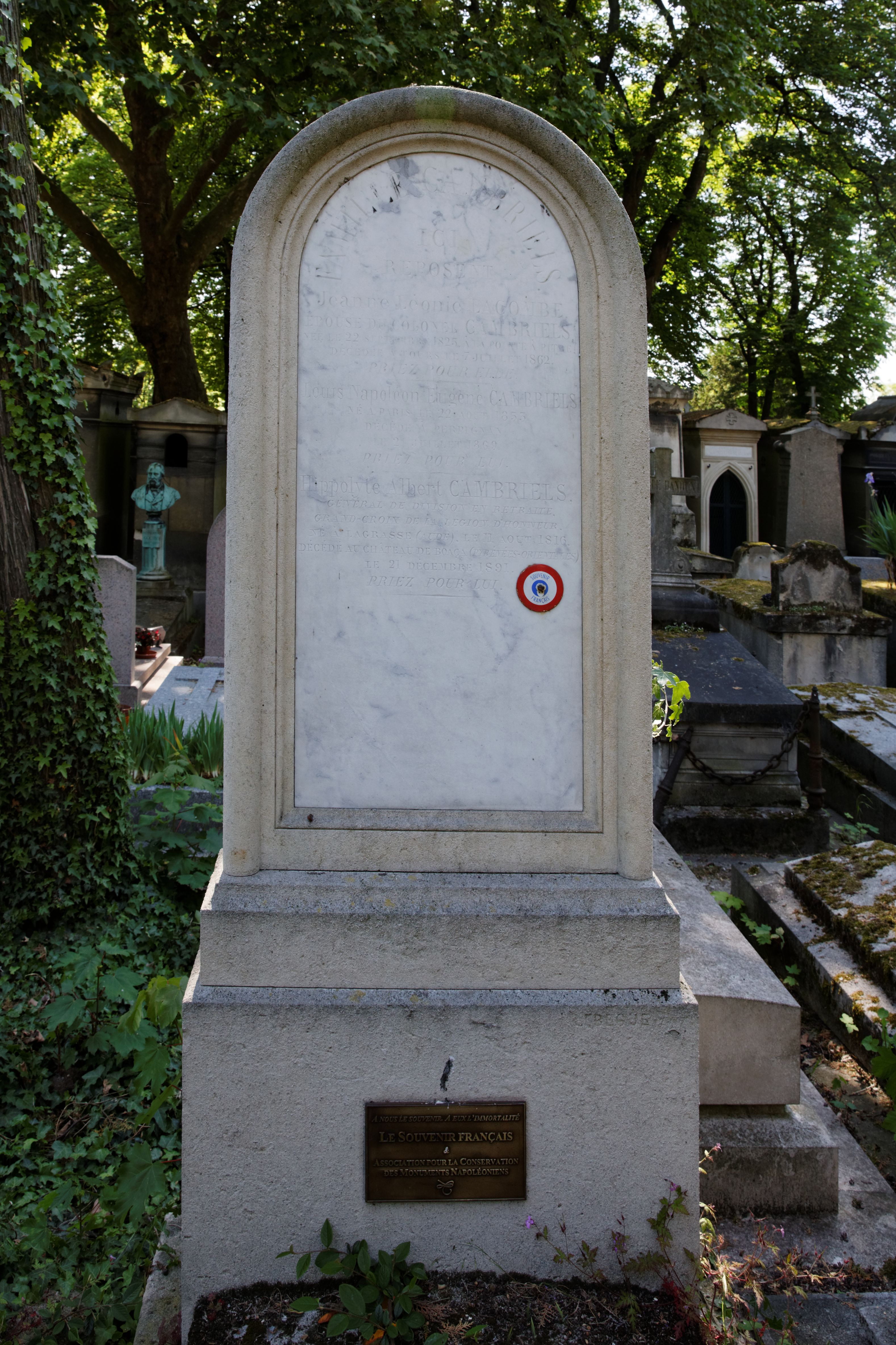 Sépulture de Albert Cambriels (1816-1891), général de division.